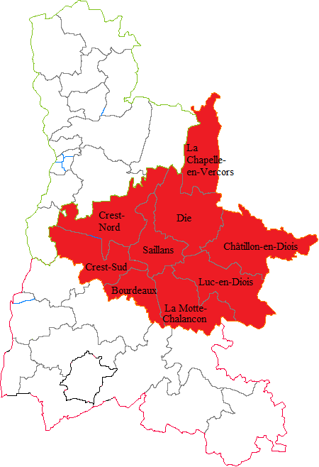 carte de l'arrondissement de Die dans la Drôme